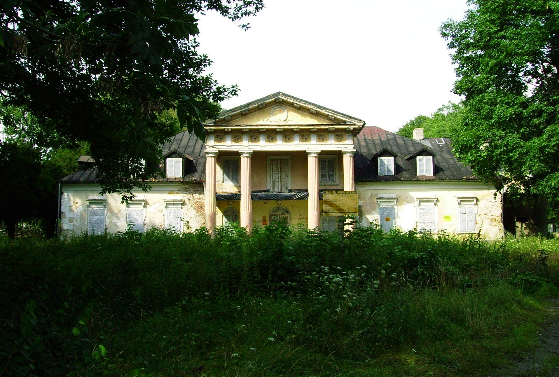 Dwór Siemieńskich w Żytnie z 1 poł. XIX w., Żytno, powiat radomszczański, województwo łódzkie Żytno, Żytno 12.1967.